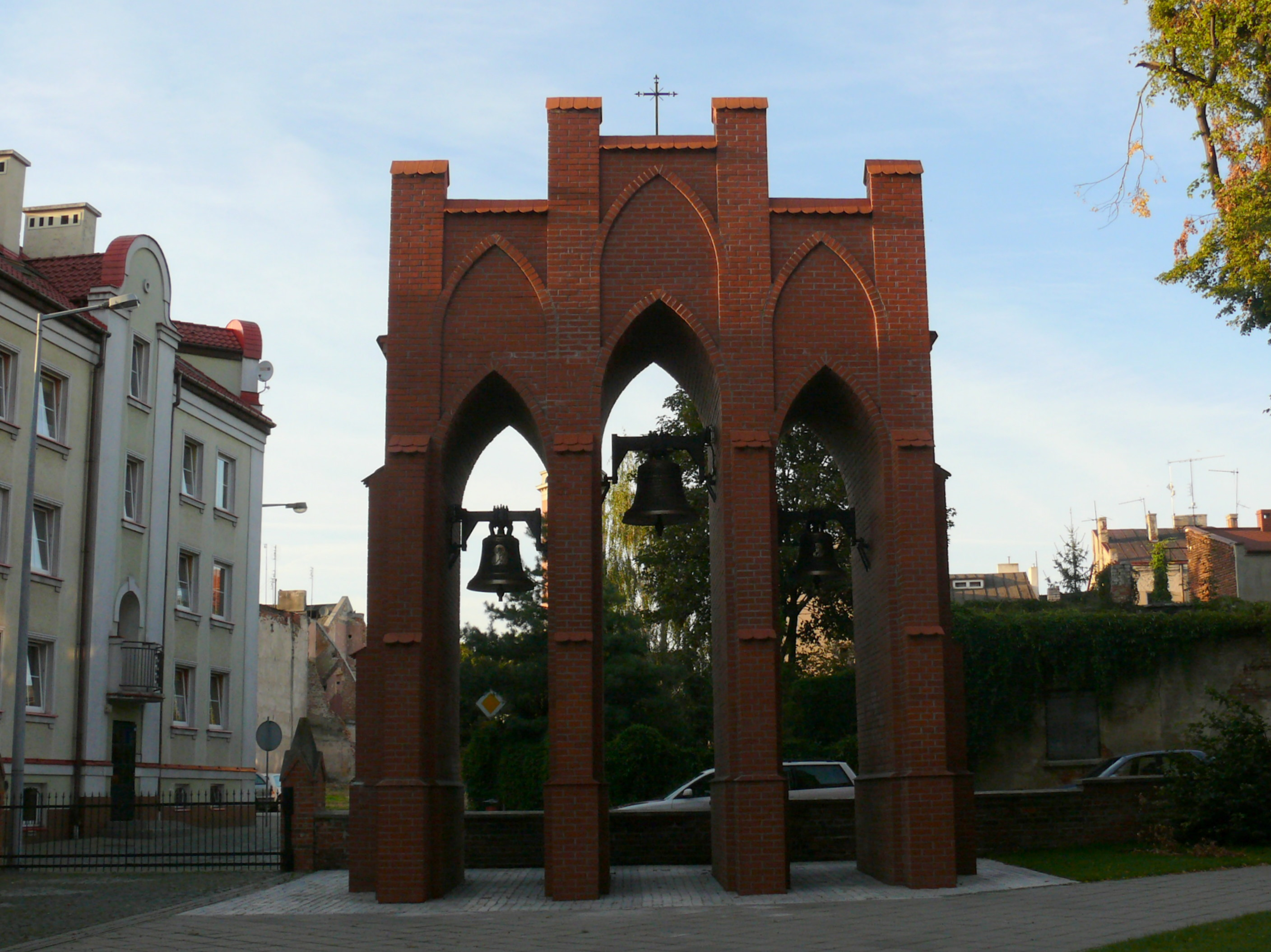 Dzwonnica przy kolskiej farze